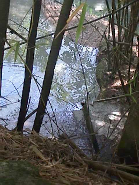 Quebrada La Boyera a nivel del Cigarral